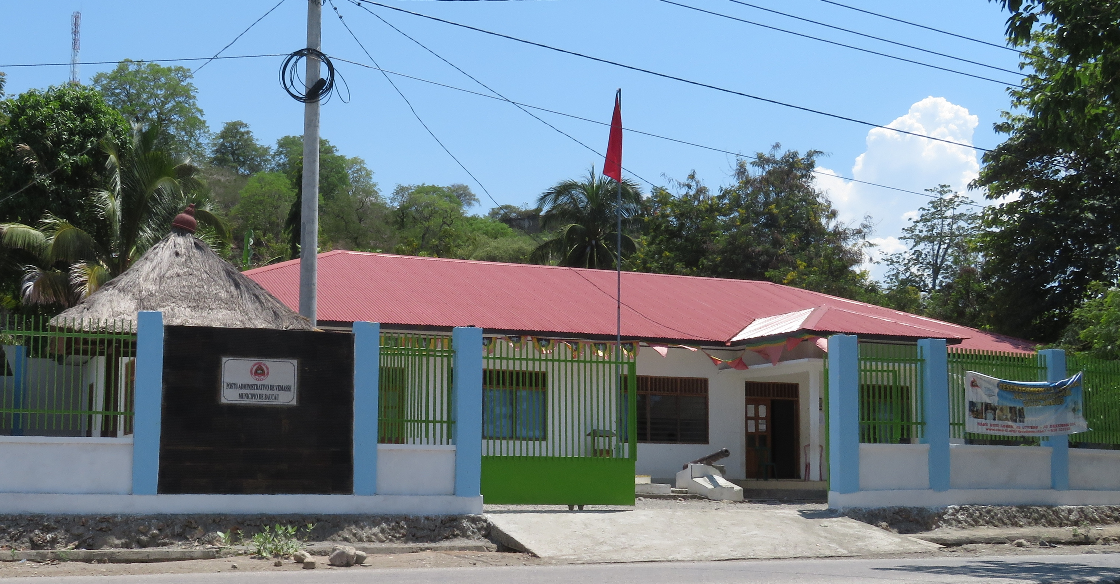 Kanone vor dem Gebäude des Verwaltungsamts Vemasse, Vemasse, Timor Leste